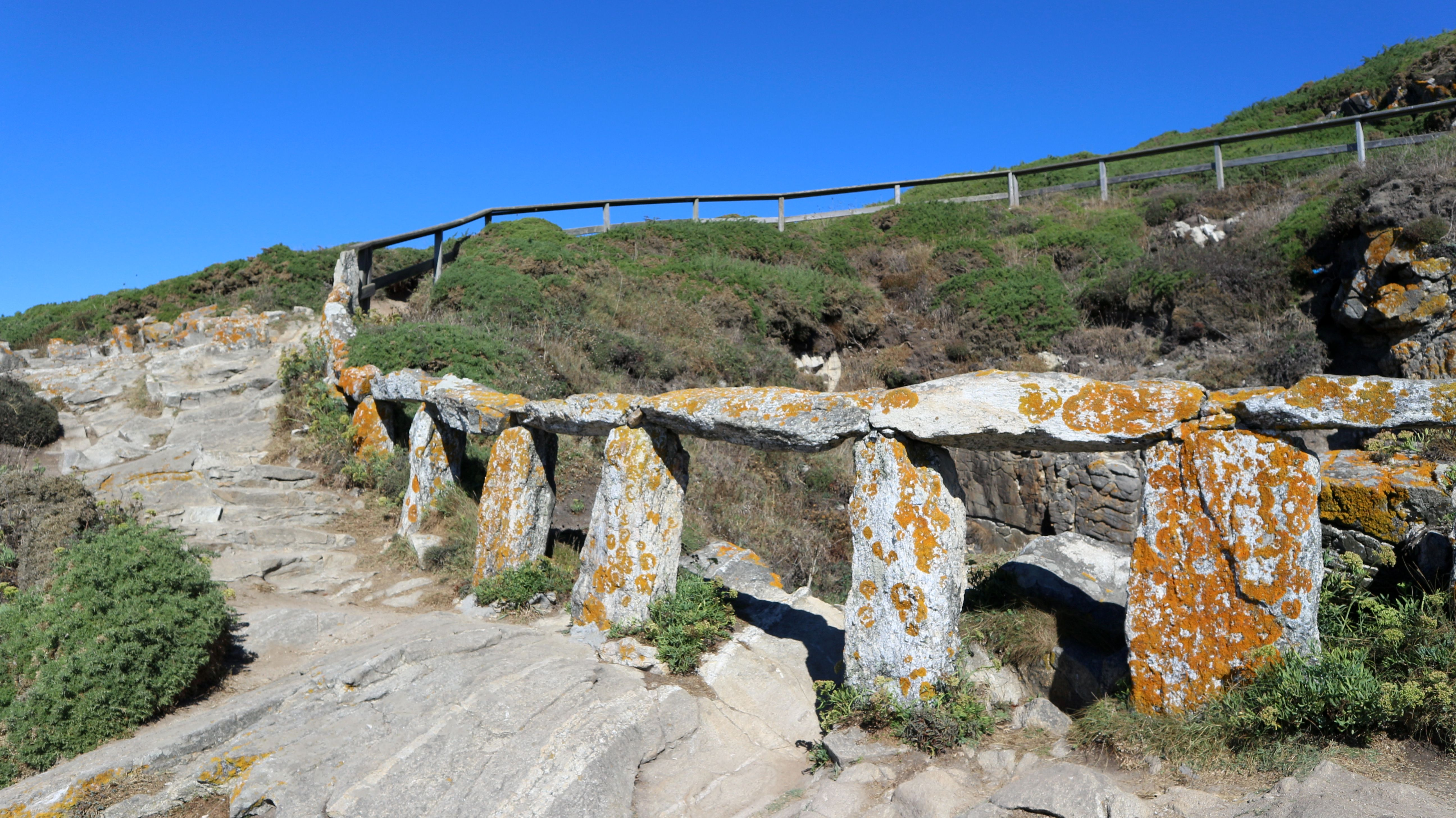 Buraco do Inferno. A Illa de Ons, Ons, Bueu - Parque Nacional das Illas Atlánticas de Galicia.